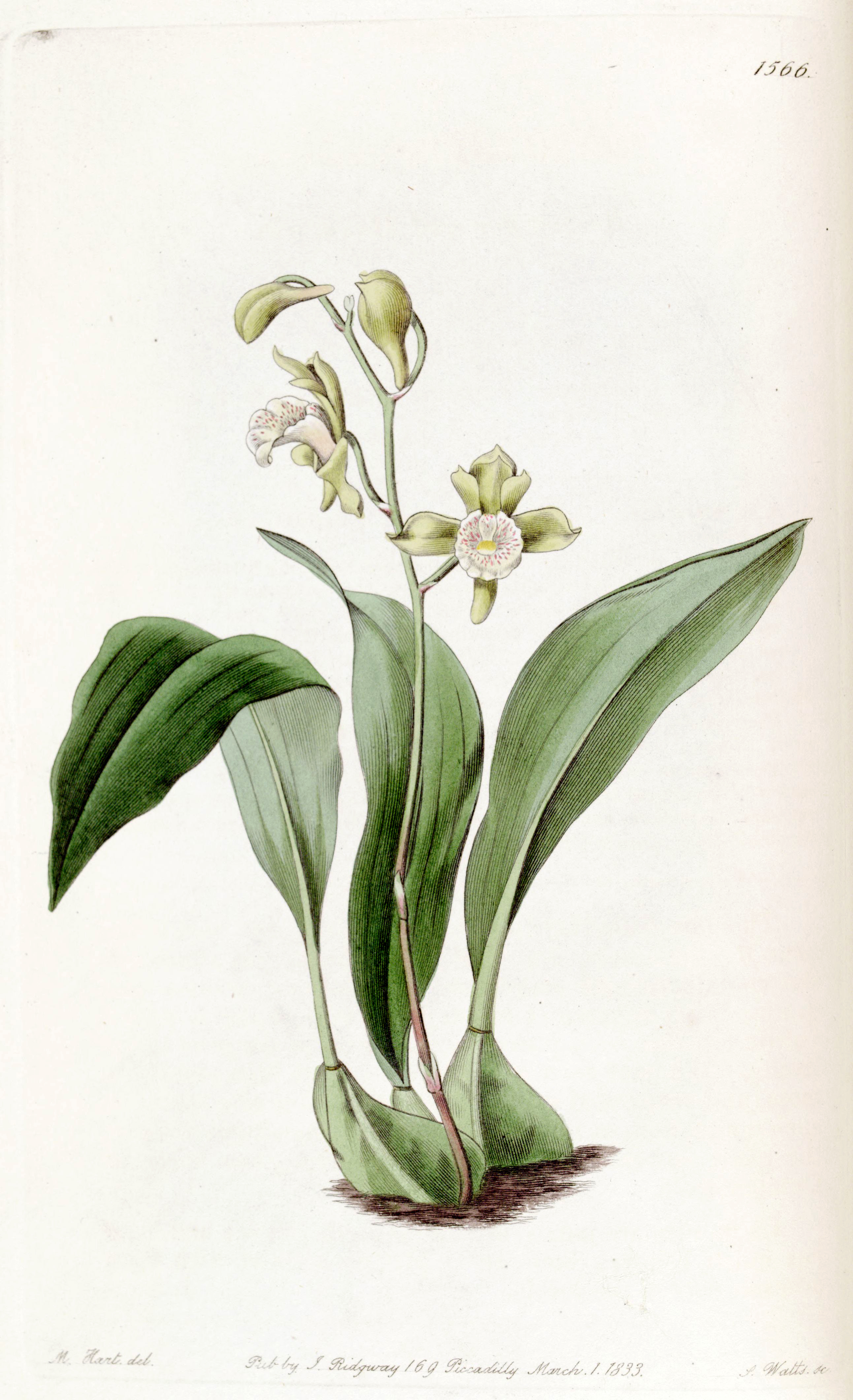 Bifrenaria racemosa (as syn. Maxillaria racemosa)